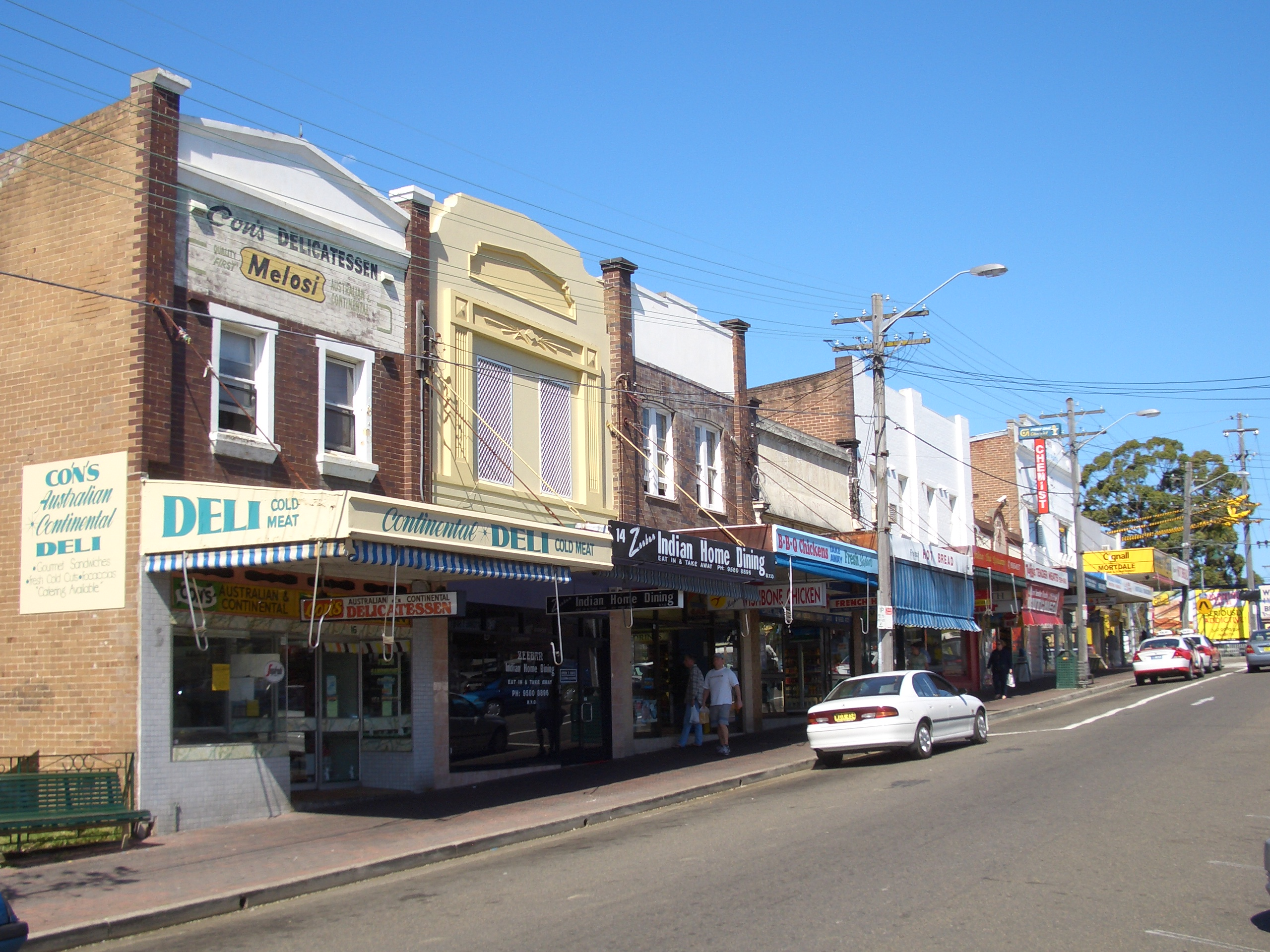 mortdale sydney